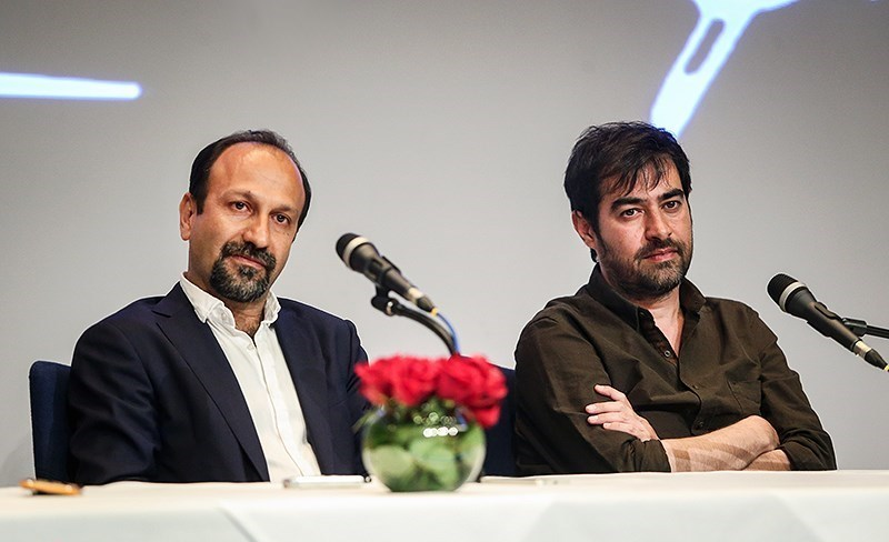 نشست خبری فیلم سینمایی فروشنده با حضور اصغر فرهادی کارگردان و شهاب حسینی و ترانه علیدوستی بازیگران این فیلم شامگاه دوشنبه ۱۰ خرداد ۱۳۹۵ در خانه همایش